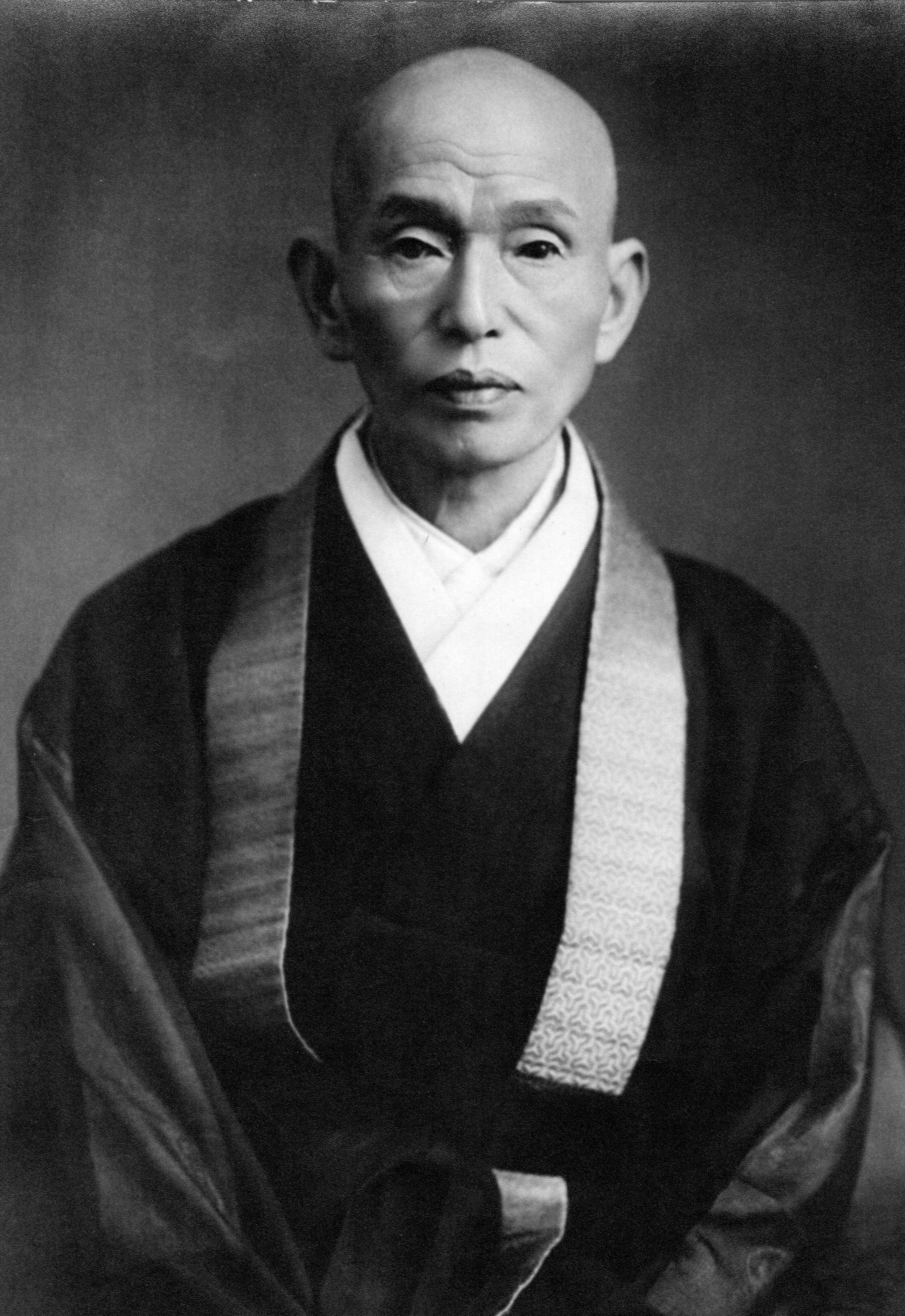 真宗学寮の初代学頭 浄土真宗本願寺派勧学